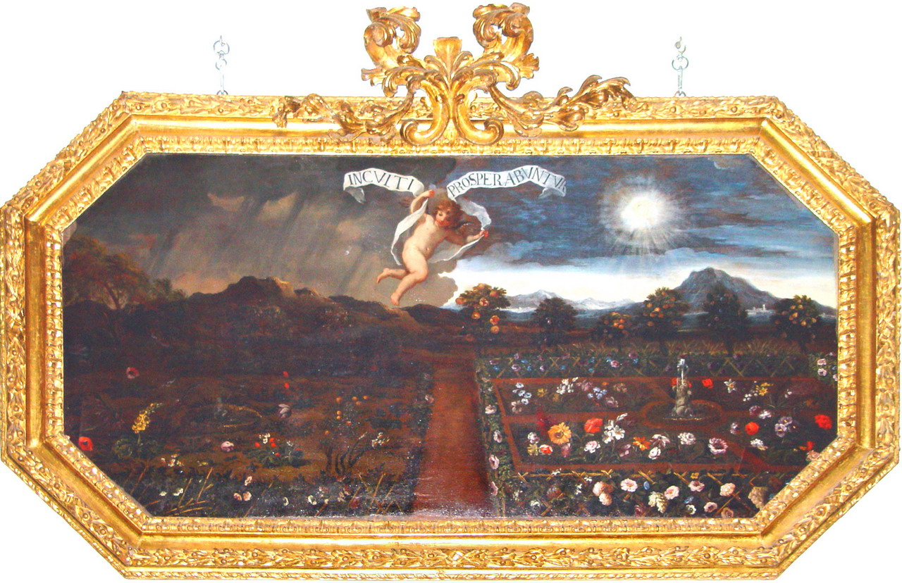 Il logo attuale della storica Accademia degli Incolti